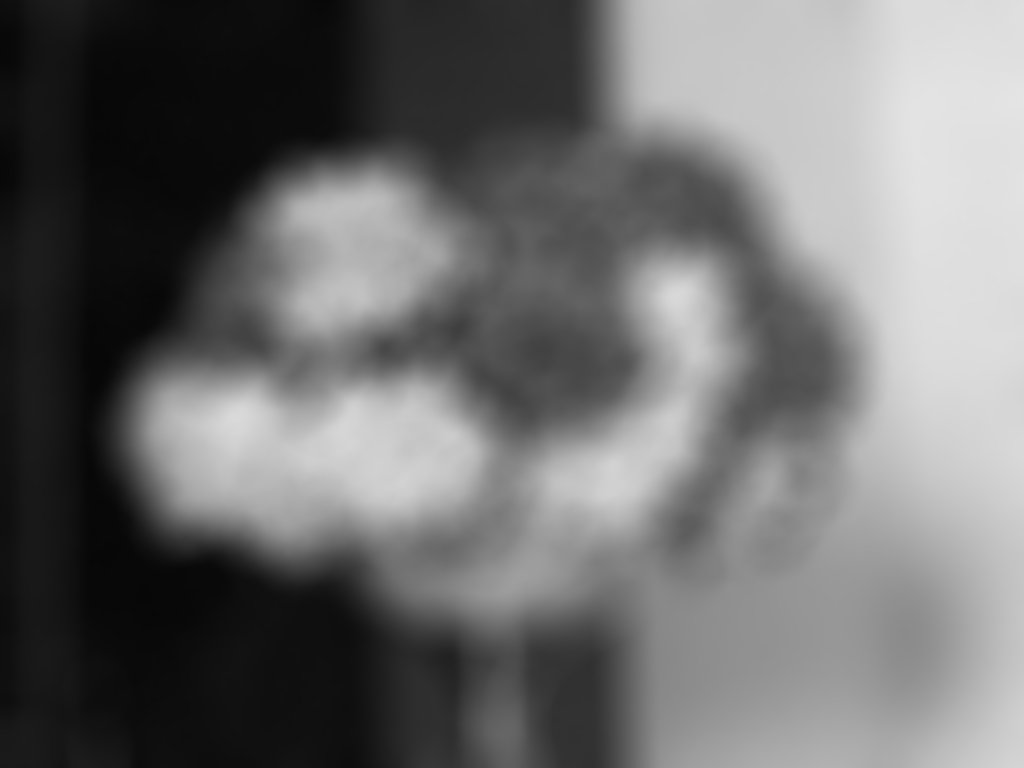 Imagem com máscara - 35px